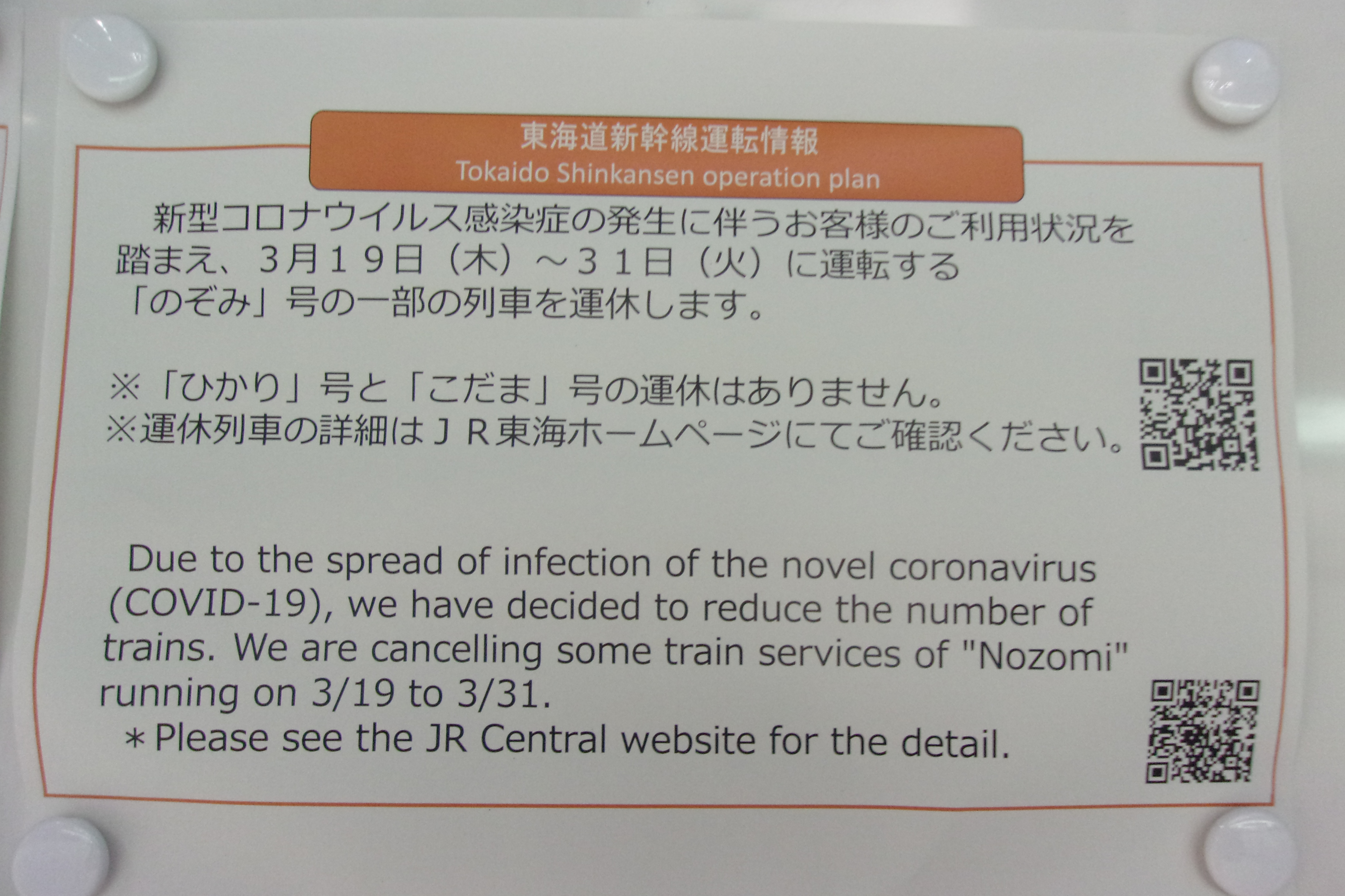 コロナウイルス流行による東海道新幹線一部運休のお知らせ（日本語・英語版）